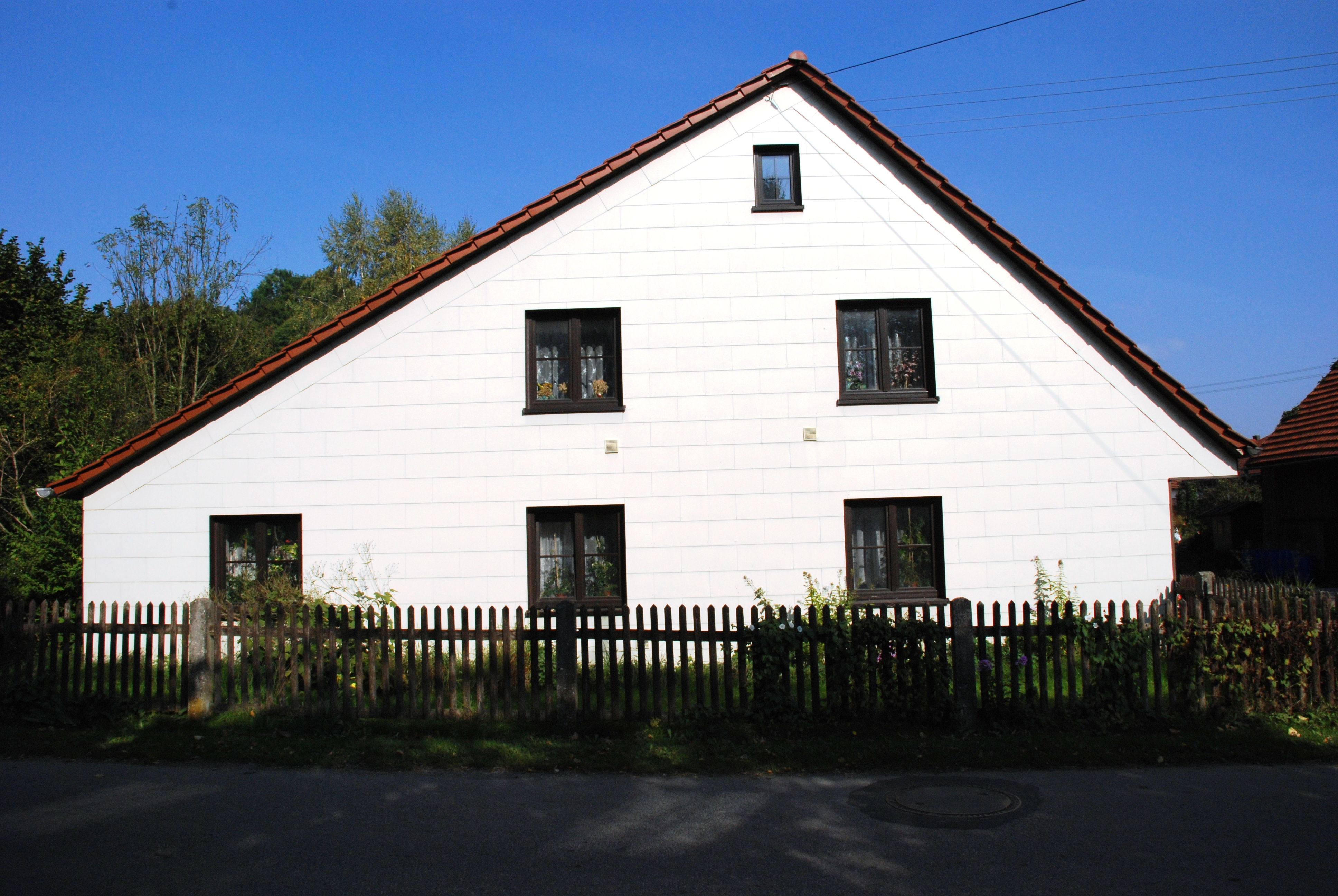 Bauernhaus mit einhüftigem Greddach in der Hetzenhauser Straße 6 in Fürholzen, Ortsteil von Neufahrn, Landkreis Freising, Regierungsbezirk Oberbayern, Bayern. Als Baudenkmal in der Bayerischen Denkmalliste aufgeführt.